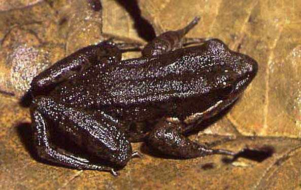 Rana nigrovittata